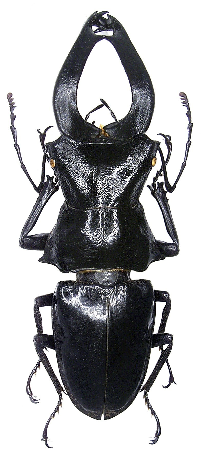 Familie: Lucanidae Grösse: 27,5-60,2 mm Verbreitung: Kolumbien, Panama Foto: U.Schmidt, 2006